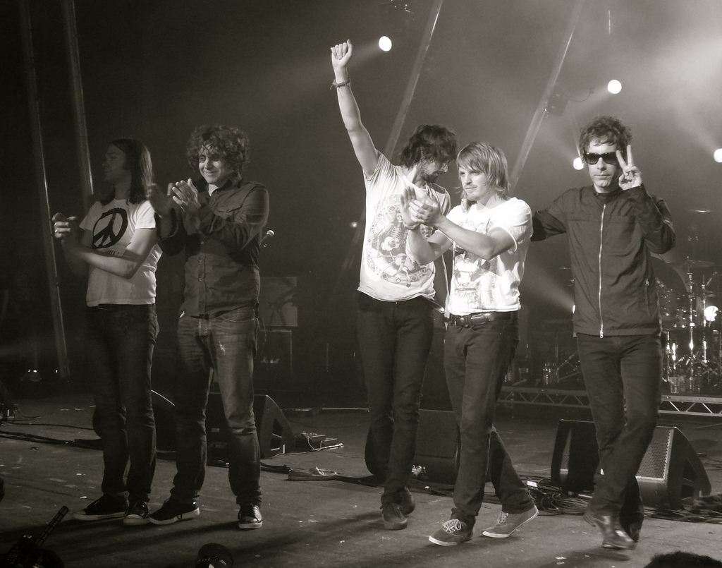 Kasabian, Brixton Academy